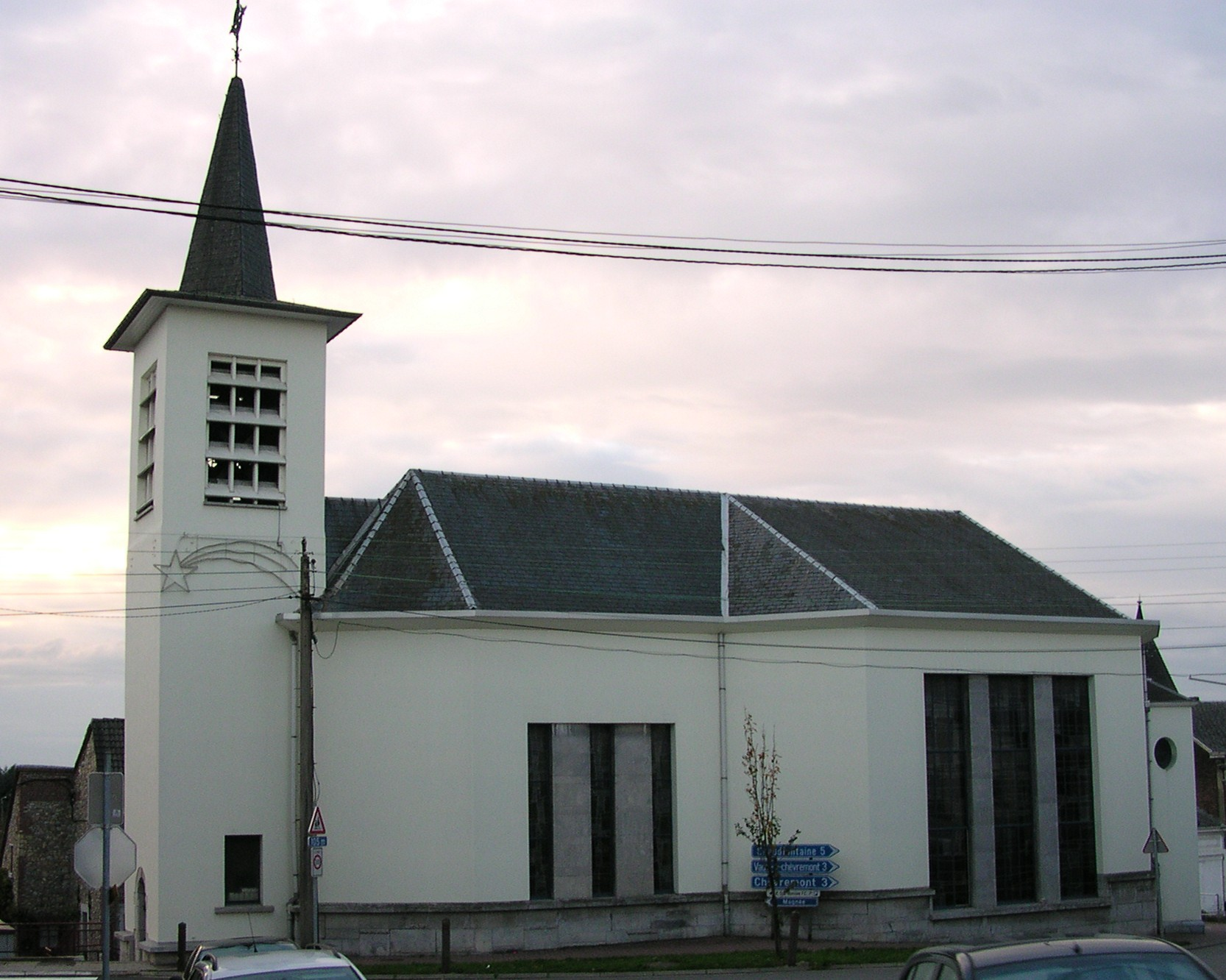 Romsée (Ortsteil von Fléron), Kirche der heiligen Jungfrau Maria